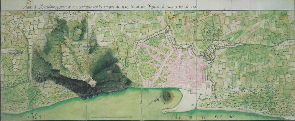 Plano de Barcelona y parte de sus contornos, con los ataques de 1697, los de los Yngleses de 1705, y los de 1706